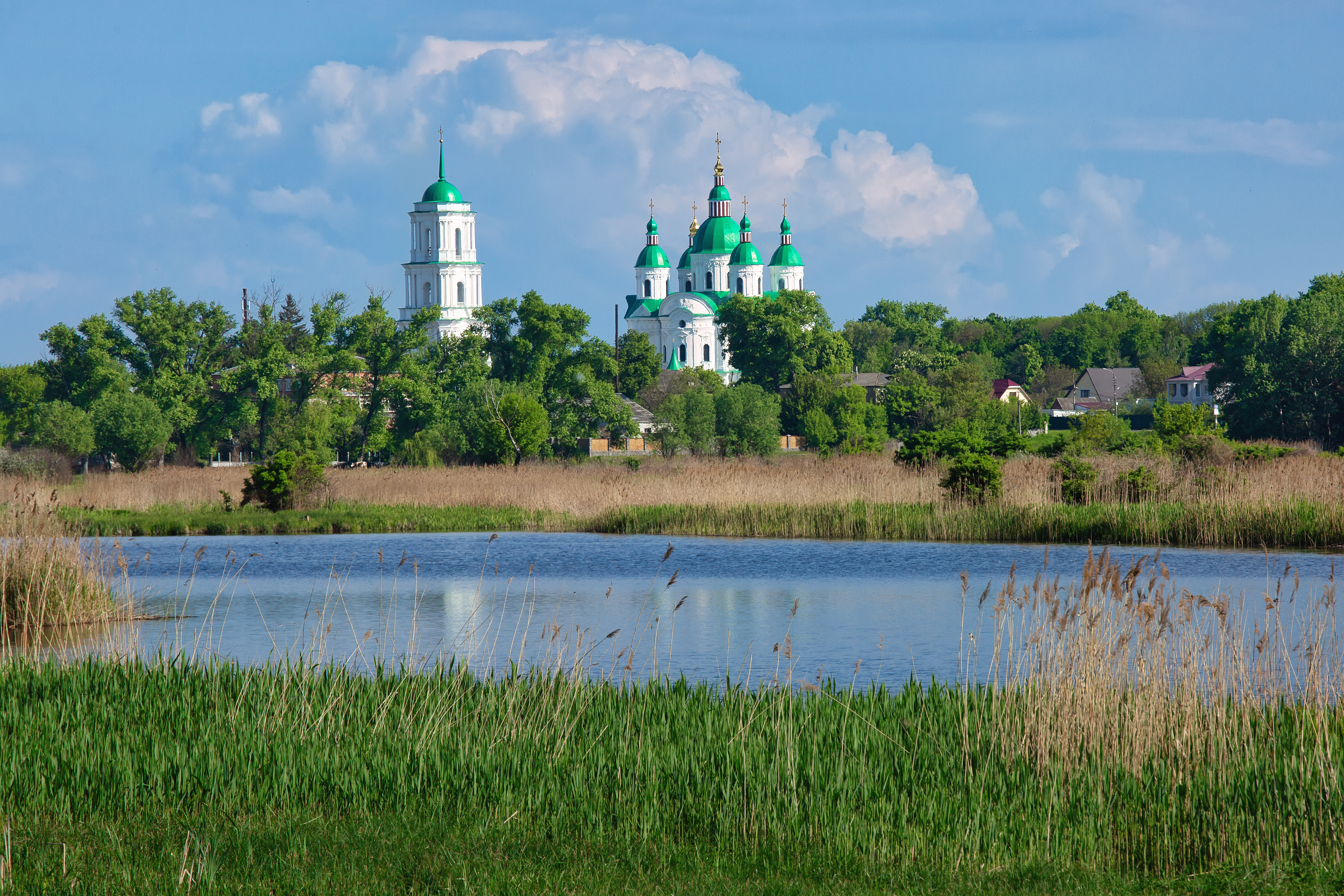 Собор Різдва Богородиці (мур.), пов’язаний з історією родини Розумовських, Козелець, вул. Даневича, 1